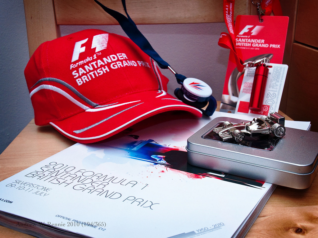 Merchandising Mclaren British GP 2010